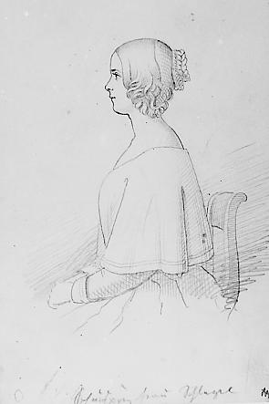 Mathilde Schlegel, Schauspielerin